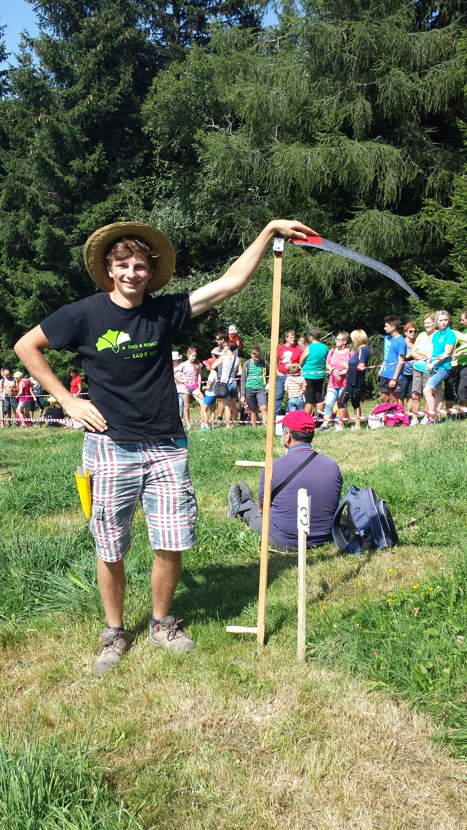 World Guinness record Slovenija 2018 KOŠNJA U SNEŽET Cerkno 2018. Postavljanje Guinnessovega rekorda v ročni košnji na dogodku Košna u snežet, katerega je organiziralo društvo: Društvo podeželske mladine Škofja Loka (DPM Škofja Loka). Na sliki je najmlajši udeleženec prireditve Jakob, star 16 let iz Nakla.